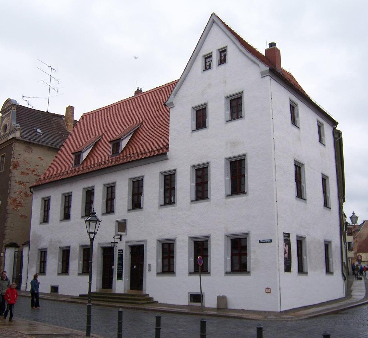 Alte Superintendentur in der Wintergrüne in Torgau (Sachsen) Die Inschrift über dem Eingang lautet: „In diesem Hause wurden im März 1530 von Luther, Melanchthon, Jonas und Bugenhagen die Torgauer Artikel, die Grundlage des Augsburgischen Bekenntnisses, zur Überreichung an den Kurfürsten Johann, den Beständigen, zum Abschluss gebracht“ eigene Aufnahme vom 16. April 2006